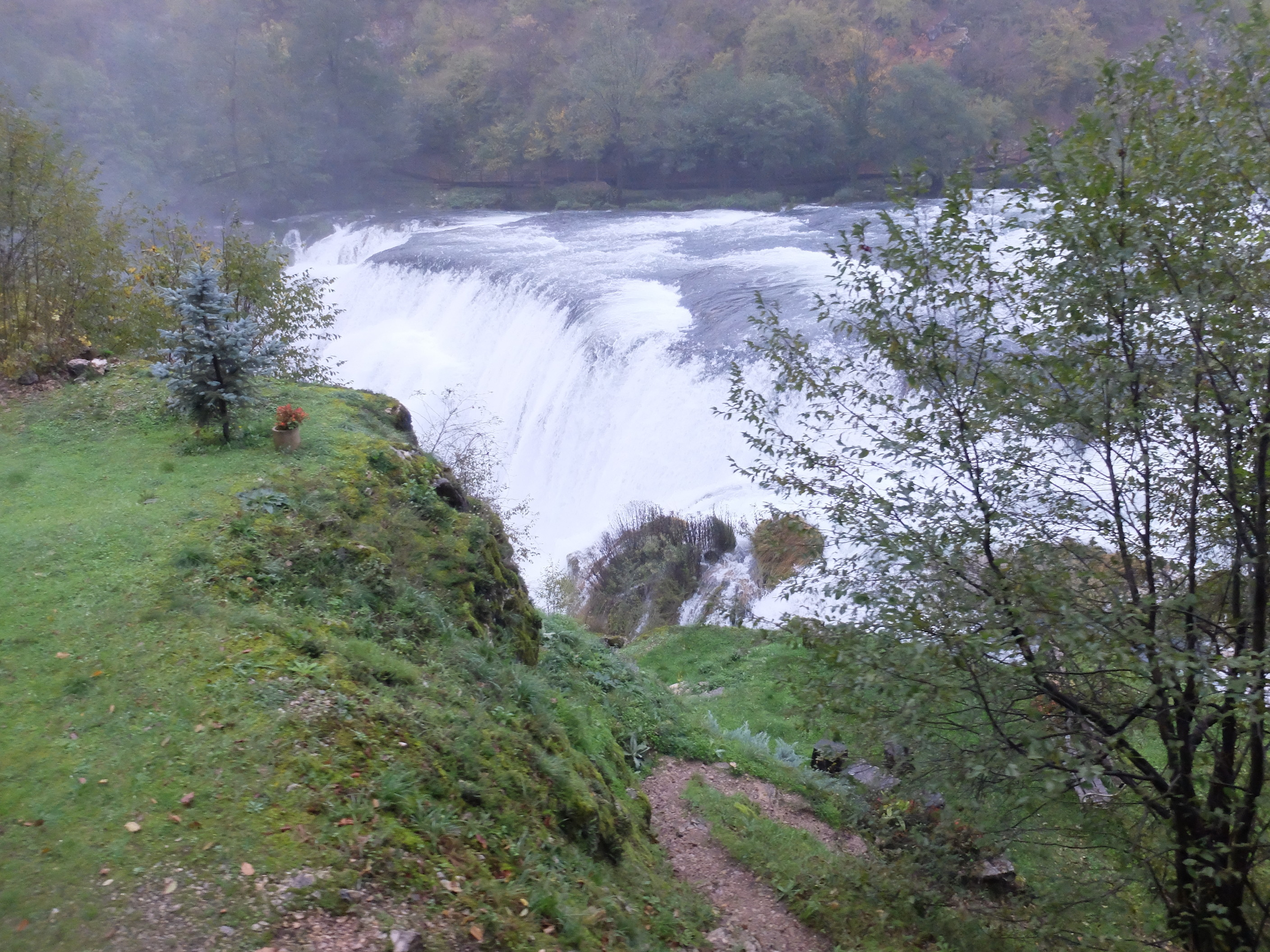 Nationalpark Una, Wasserfall Štrbački buk